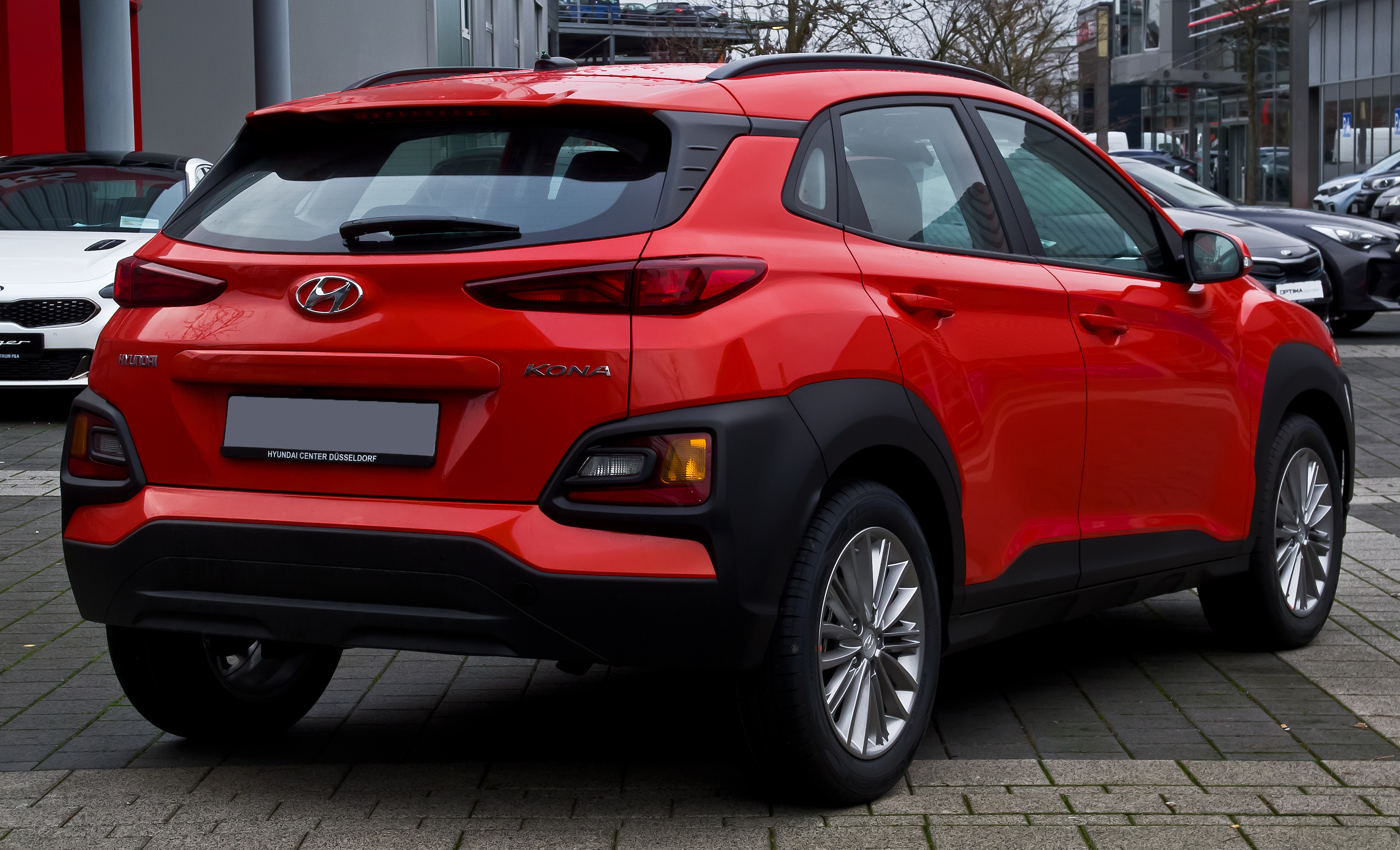 Hyundai Kona 1.0 T-GDI Trend